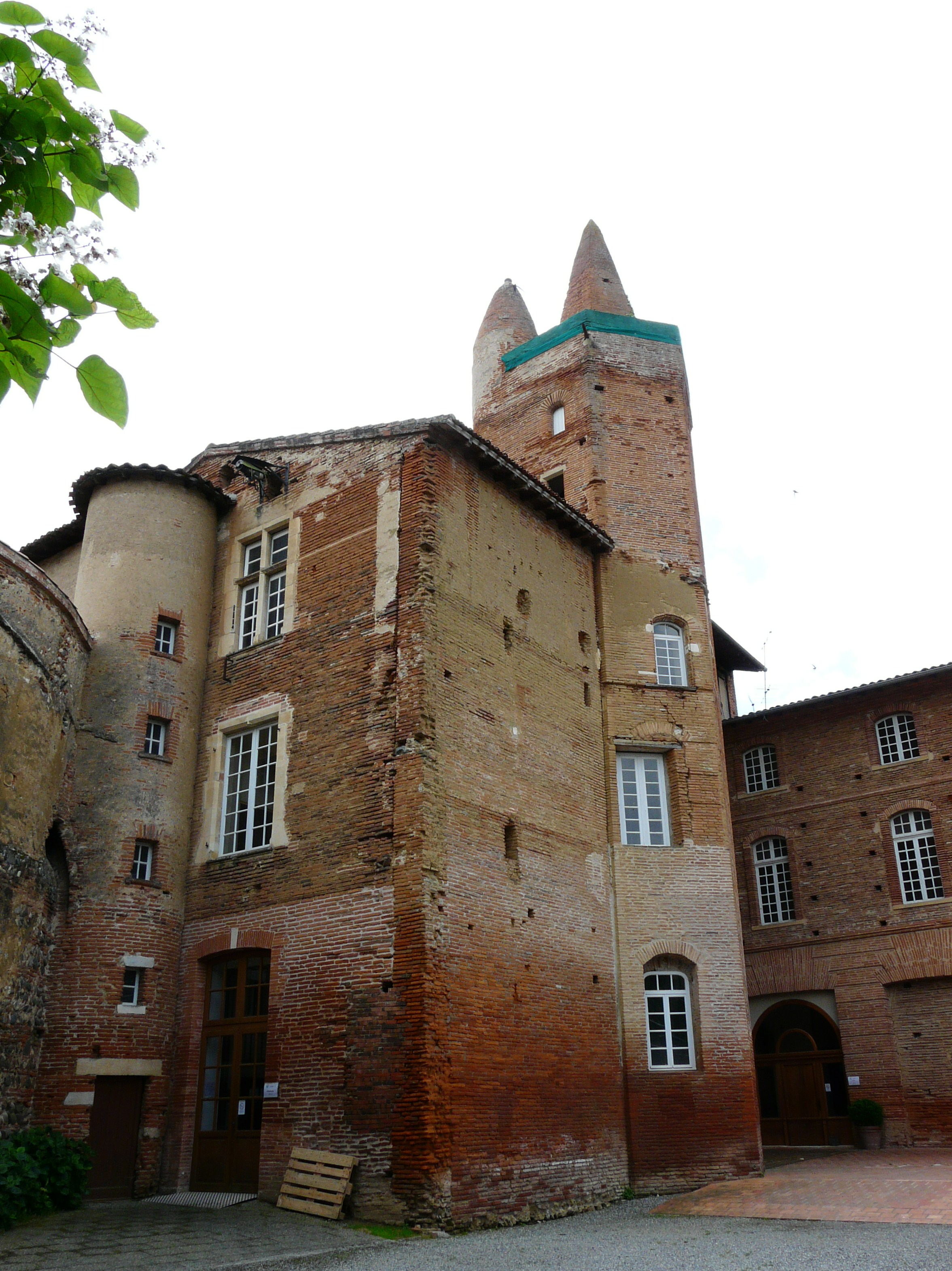 Cour intérieure de la maison Laguens, Rieux-Volvestre, Haute-Garonne, France